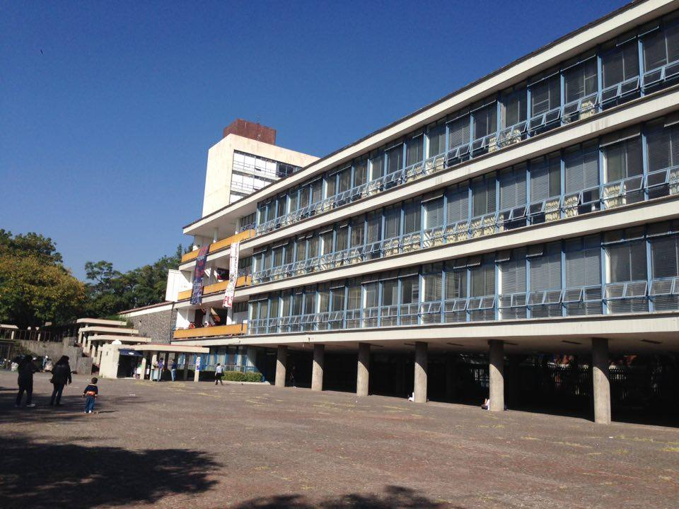 Facultad de Filosofía y Letras, UNAM, México